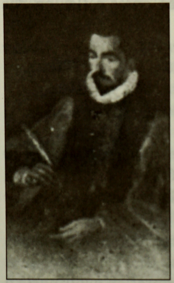 Pierre Pithou